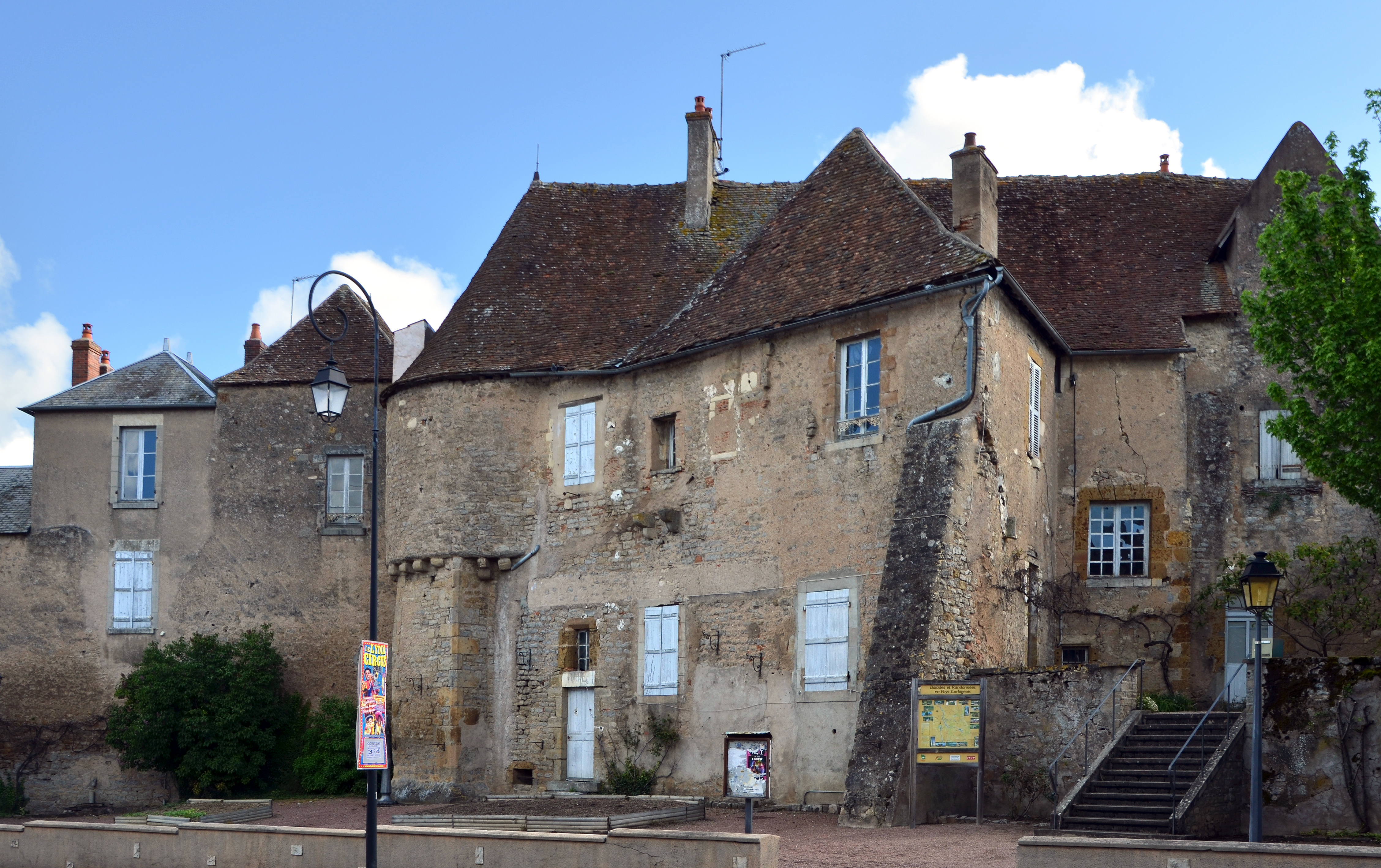 Vielles maisons à Corbigny, Nièvre, France